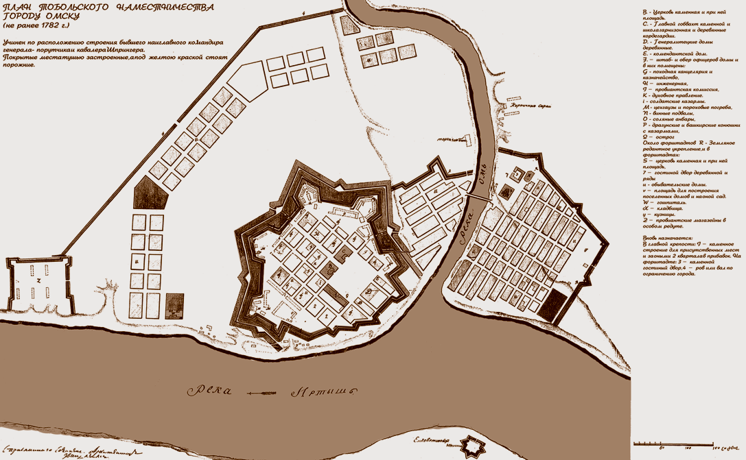 Вторая Омская крепость. План с экспликацией. Не ранее 1782 г. Из фондов Омского государственного историко-краеведческого музея.